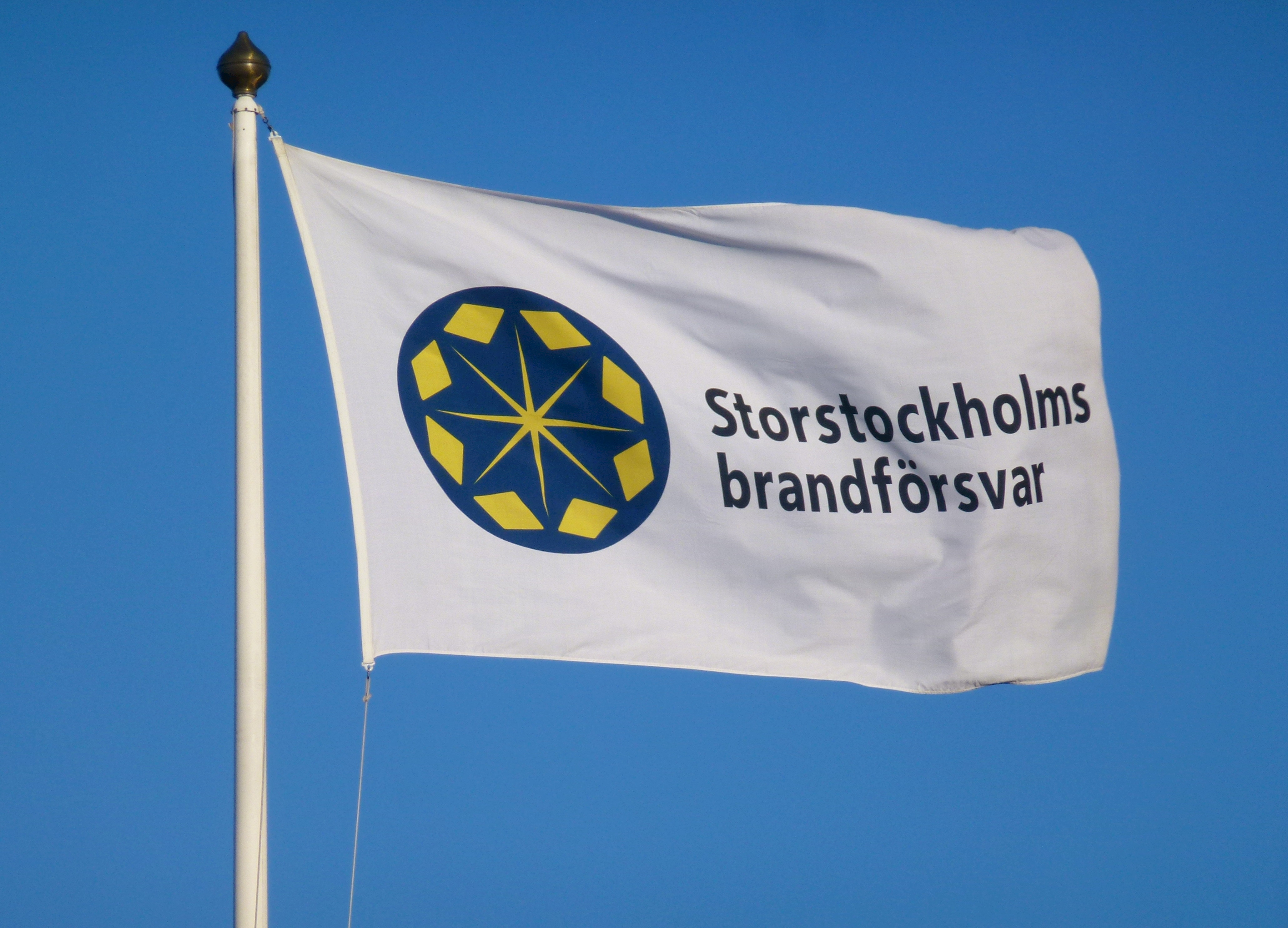 Storstockholms brandförsvarets flagga utanför Brännkyrka brandstation